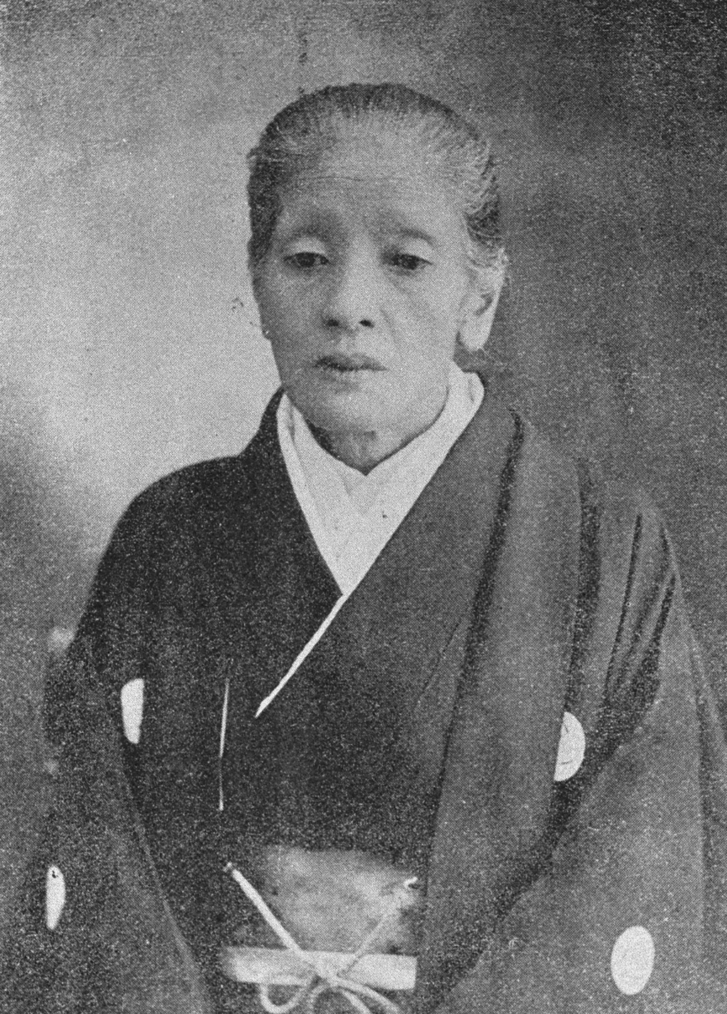 Portrait of Yamakawa Futaba (山川二葉, 1844 – 1909)